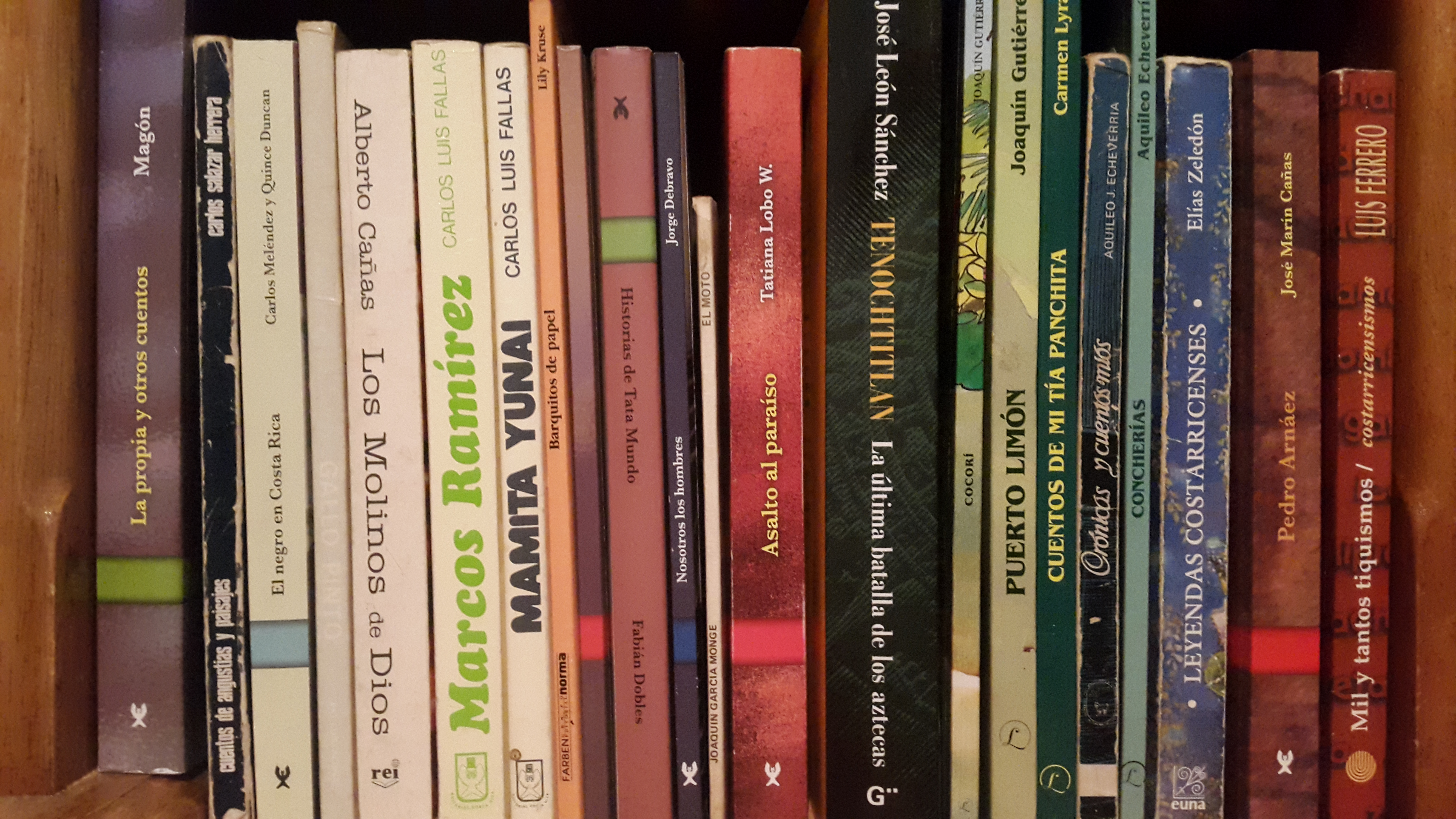 Estante de biblioteca con diversos libros de autores costarricenses. De izquierda a derecha: La propia, de Manuel González Zeledón "Magón"; Cuentos de angustias y paisajes, de Carlos Salazar Herrera; El negro en Costa Rica, de Quince Duncan; Gallo Pinto, de Pío Luis Acuña; Los molinos de Dios, de Alberto Cañas; Marcos Ramírez y Mamita Yunai, de Carlos Luis Fallas; Barquitos de papel, de Lily Kruse; Juan Varela, de Adolfo Herrera García; Historias de Tata Mundo, de Fabián Dobles; Nosotros los hombres, de Jorge Debravo; El moto, de Joaquín García Monge; Asalto al Paraíso, de Tatiana Lobo; Tenochtitlan: la última batalla de los aztecas, de José León Sánchez; Cocorí y Puerto Limón, de Joaquín Gutiérrez; Cuentos de mi tía Panchita, de Carmen Lyra; Crónicas y cuentos míos y Concherías, de Aquileo Echeverría; Leyendas costarricenses, de Elías Zeledón; Pedro Arnáez, de José Marín Cañas, y Mil y tantos tiquismos: costarricensismos, de Luis Ferrero Acosta.